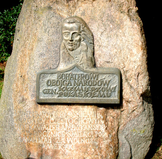 Koszalin, Park przy Amfiteatrze, Głaz narzutowy z plakietą upamiętniąjcą gen. Kazimierza Pułaskiego